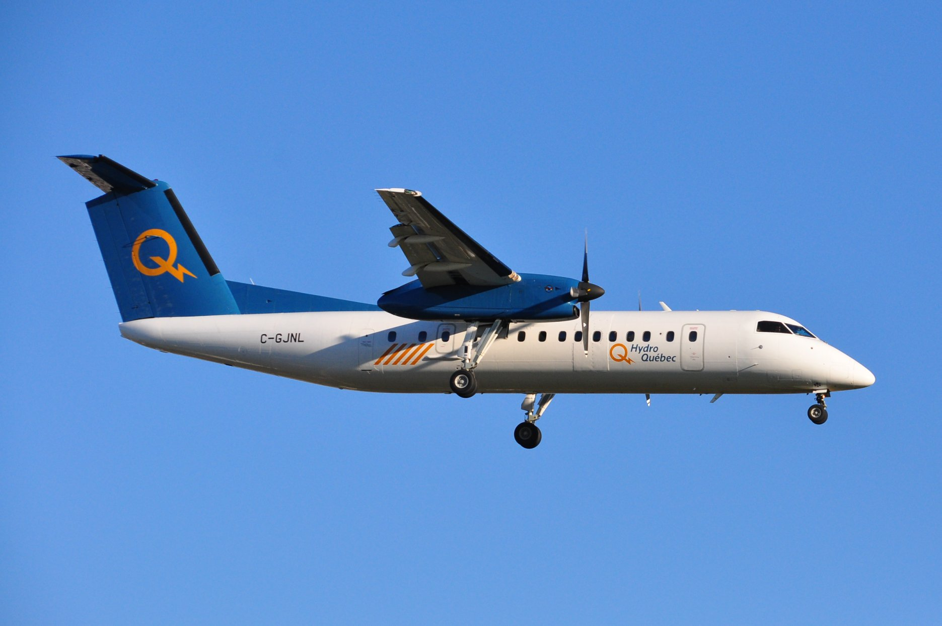 Hydro-Québec Dash 8 C-GJNL